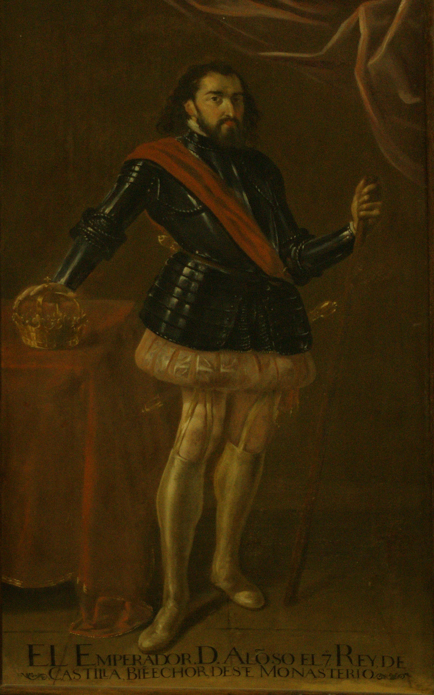 Retrato de Alfonso VII de Castilla (1105-1157)